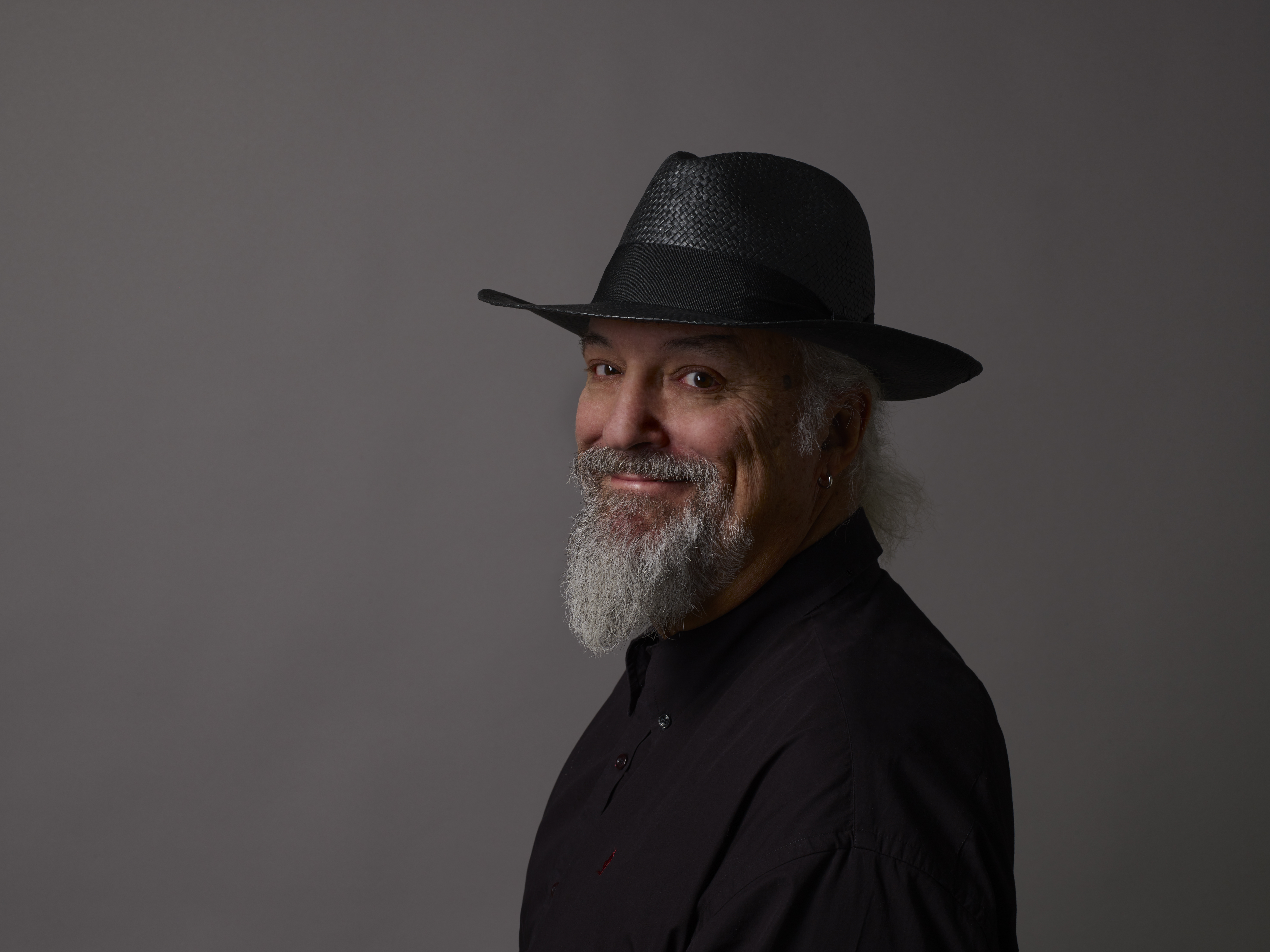 Eugenio Finardi